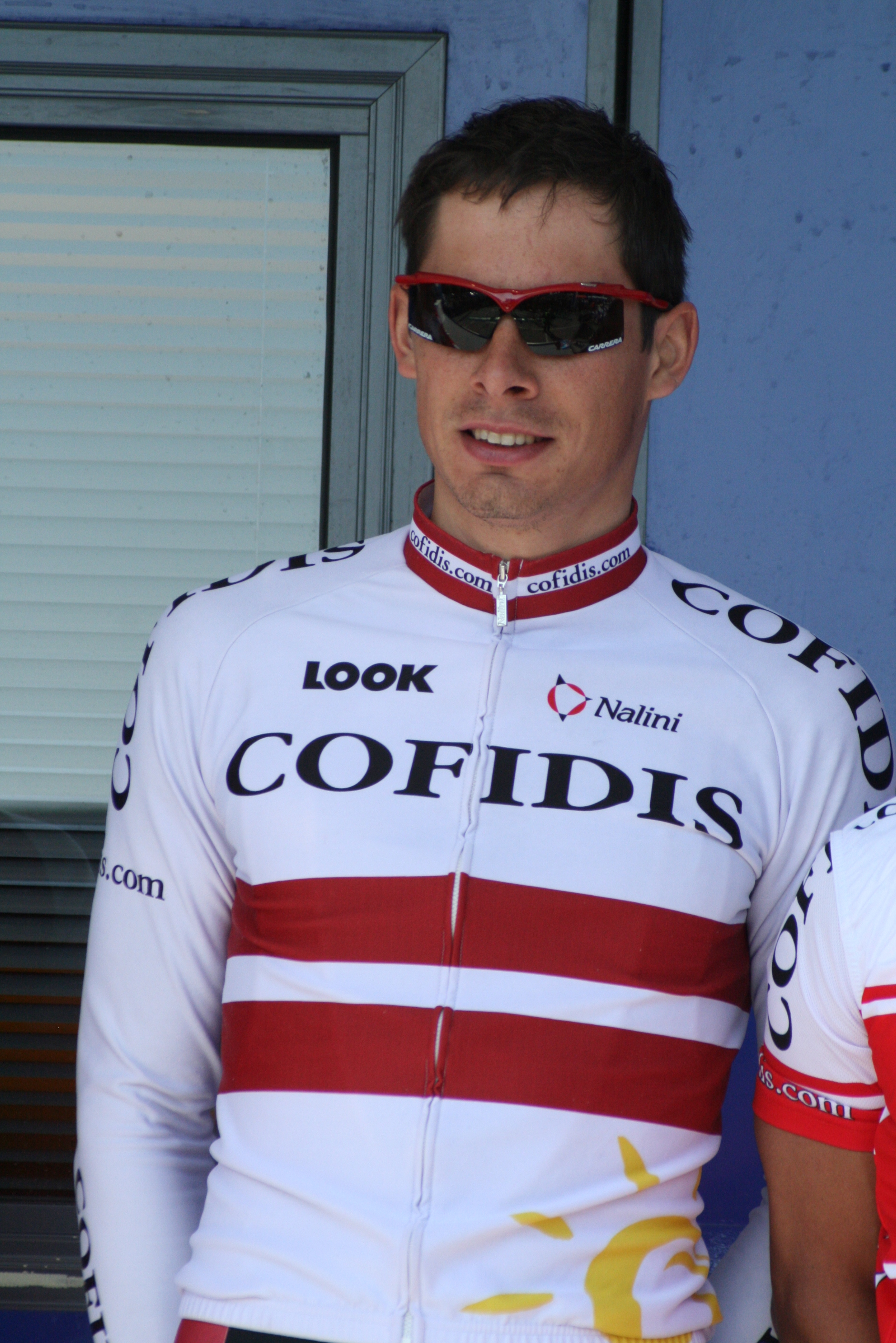 Présentation des coureurs au départ de la première étape Aleksejs Saramotins